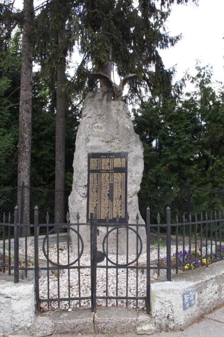 Das Soldatendenkmal (I. und II. Weltkrieg) in der niederösterreichischen Gemeinde Hirtenberg.